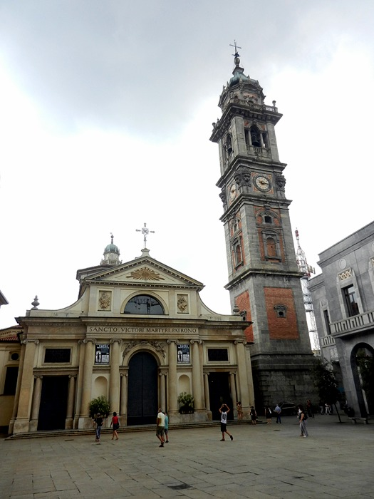 Varese - Basilica di S. Vittore